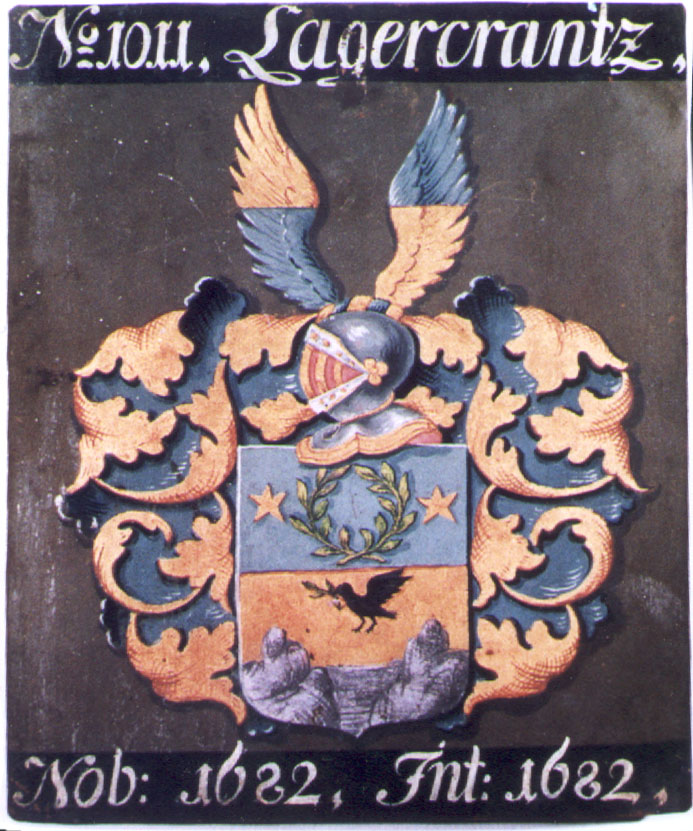 Vapensköld från 1682 för släkten Lagercrantz med nr 1011 i adelskalendern.